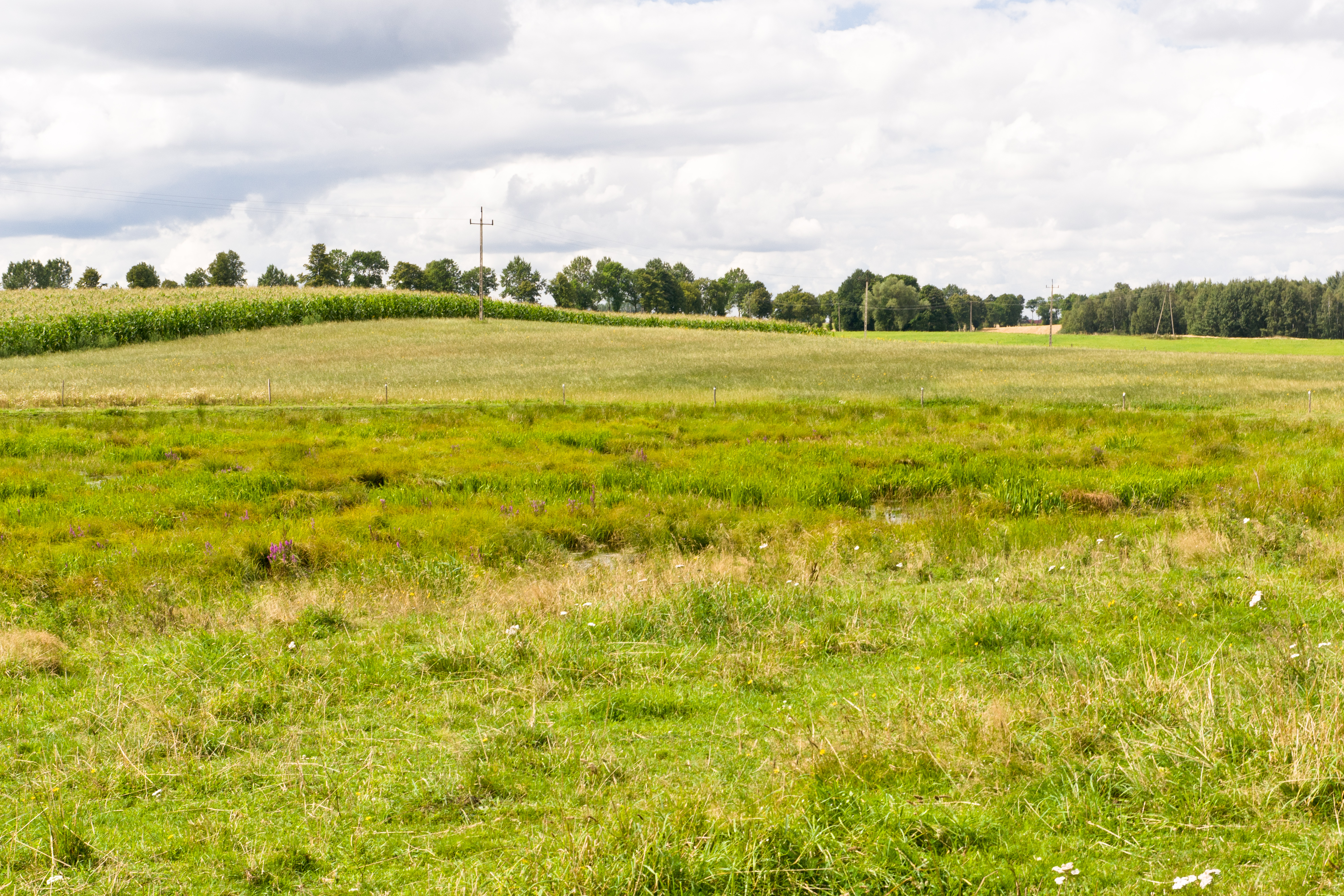 Widok na pola w pobliżu cmentarza ewangelickiego w miejscowości Zanie.